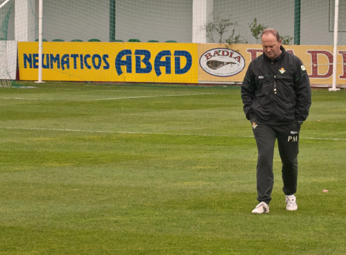 Pepe Mel, durante un entrenamiento del Real Betis en la ciudad deportiva el día 30 de diciembre de 2010